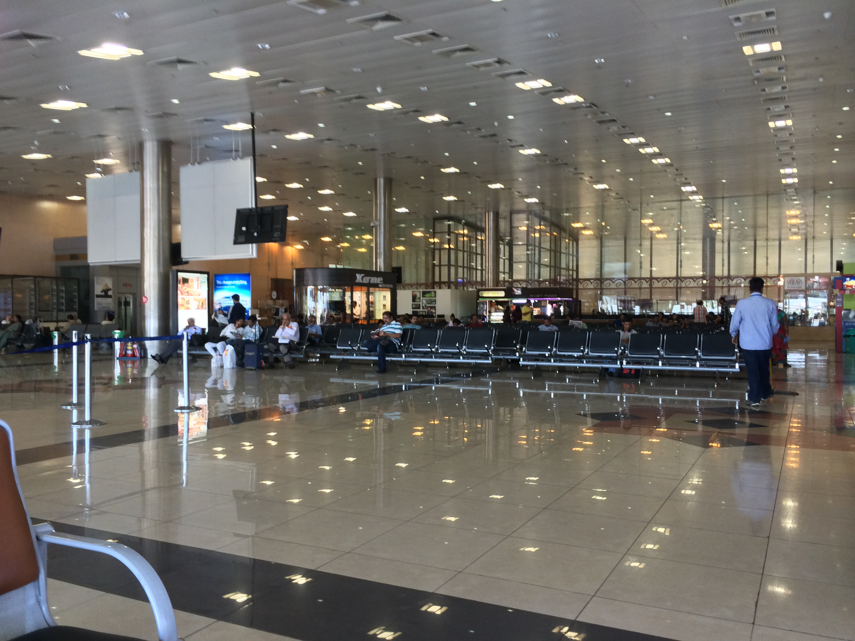 Pune airport Maharashtra India January 2014